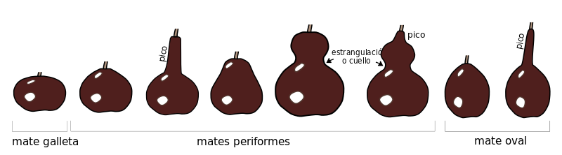 tipos de Lagenaria seggún la forma